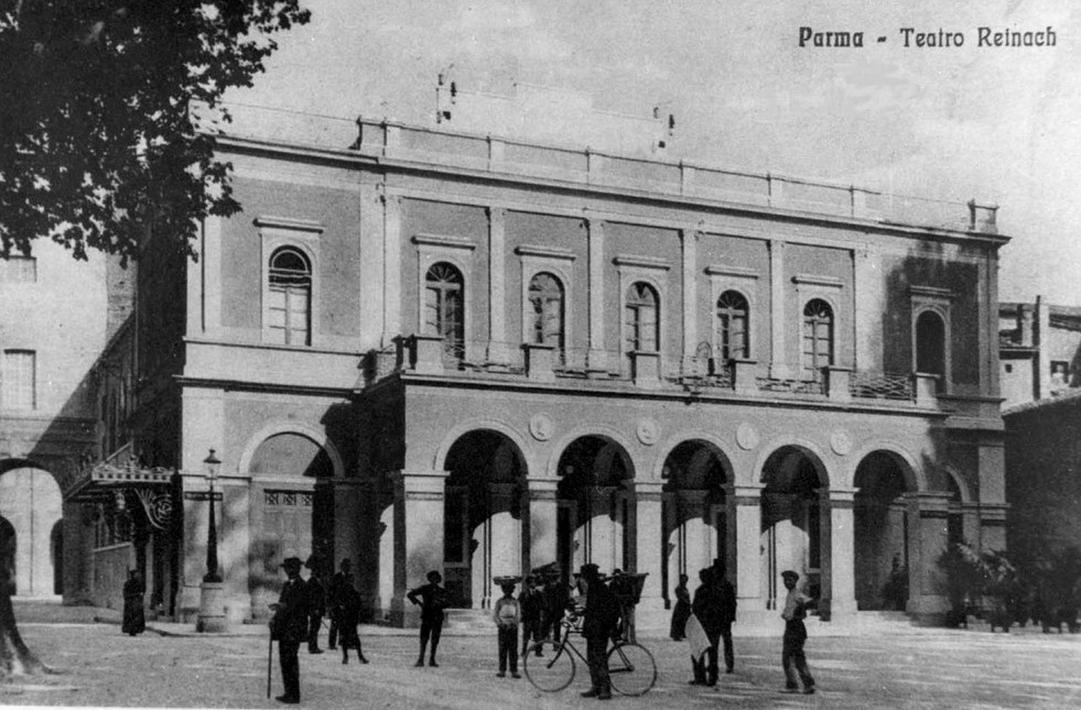 teatro Politeama Reinach di Parma